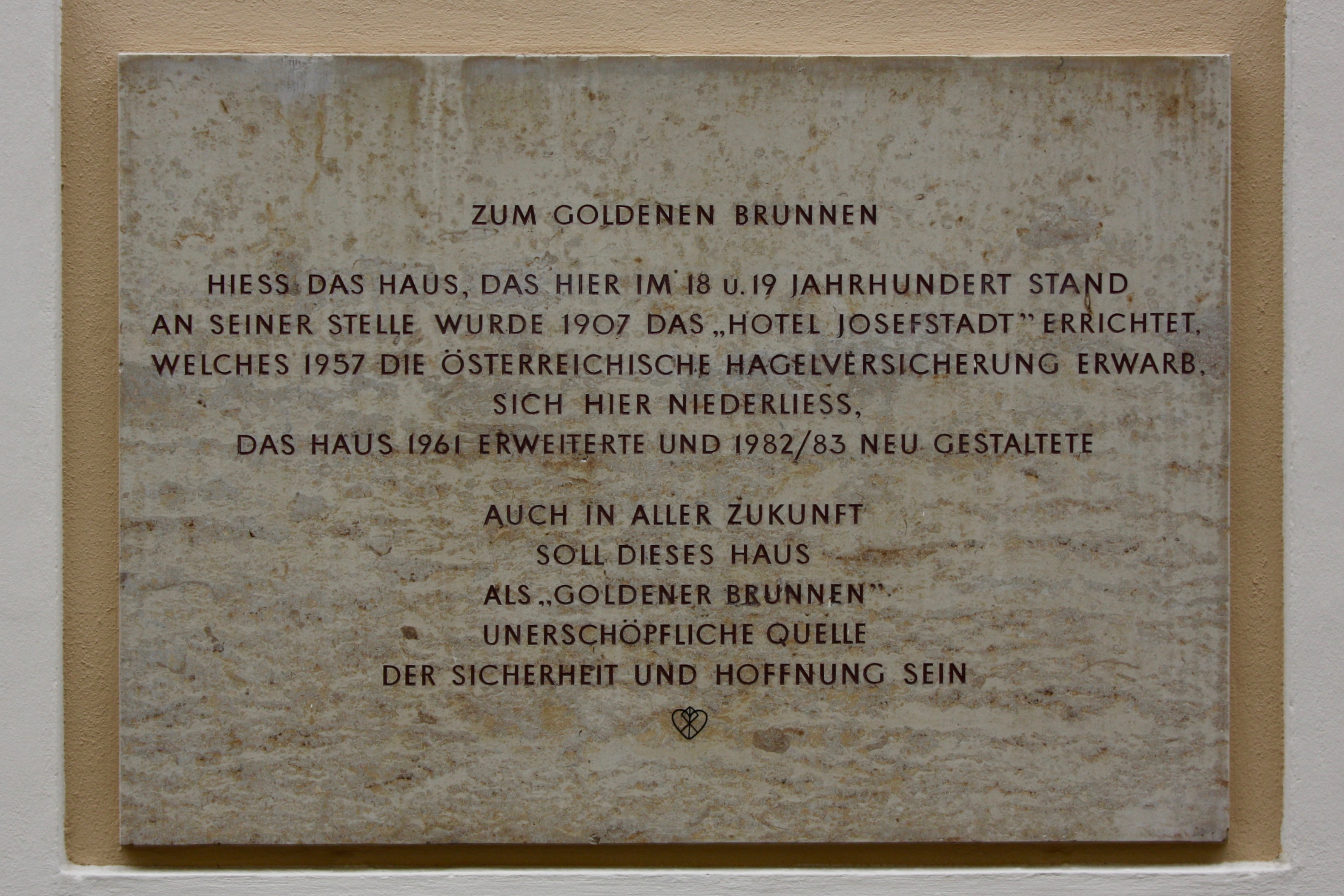 Gedenktafel am Wohnhaus Lerchengasse 3–5, Wien-Josefstadt.